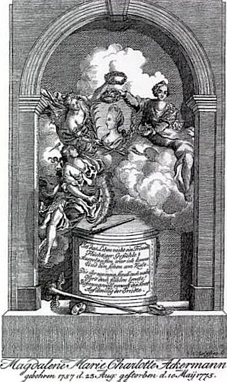 Entwurf zu einem Denkmal für die Schauspielerin Charlotte Ackermann.